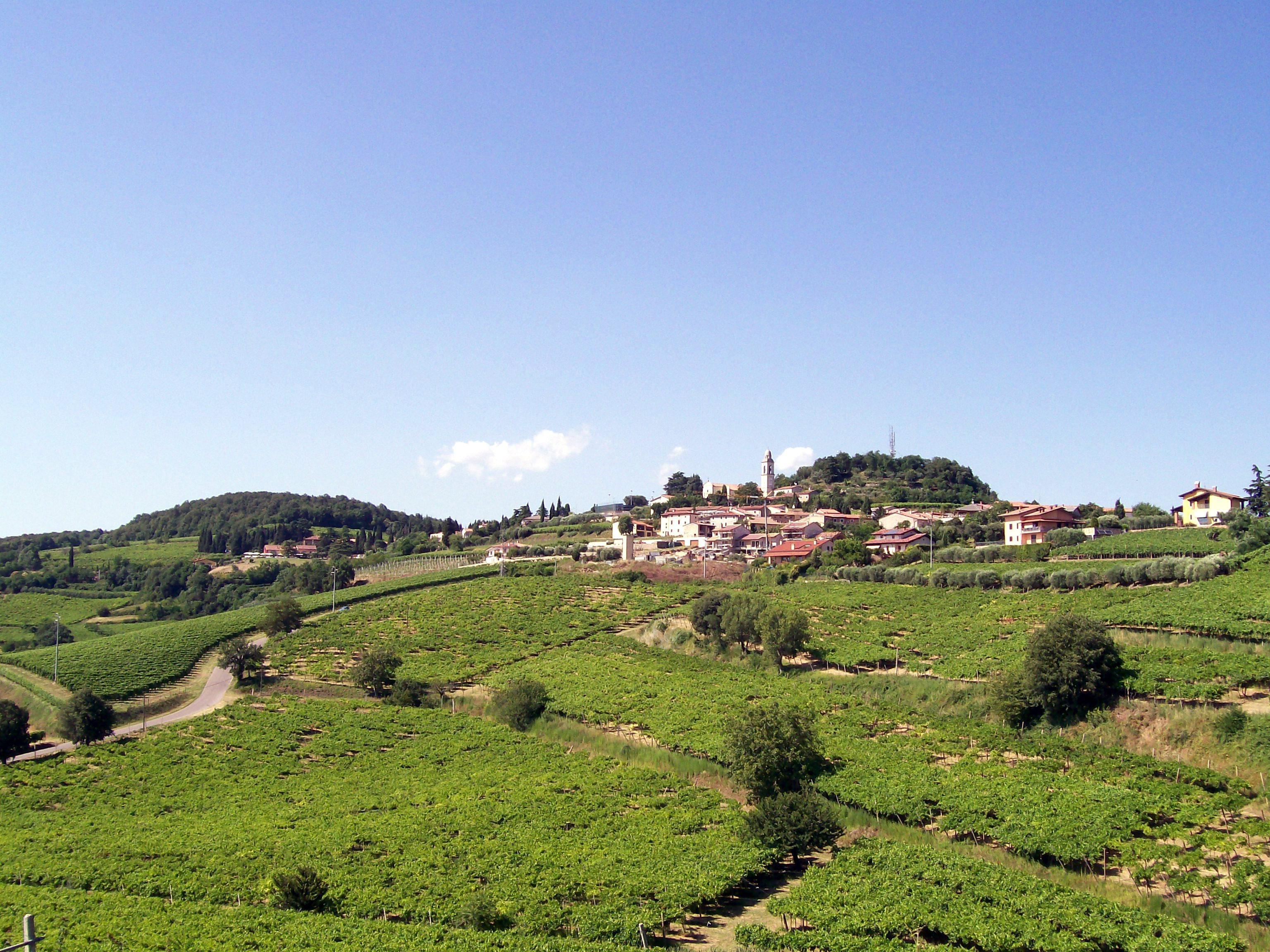 Panorama di Castelcerino dalla strada provinciale 58 che sale da Soave.